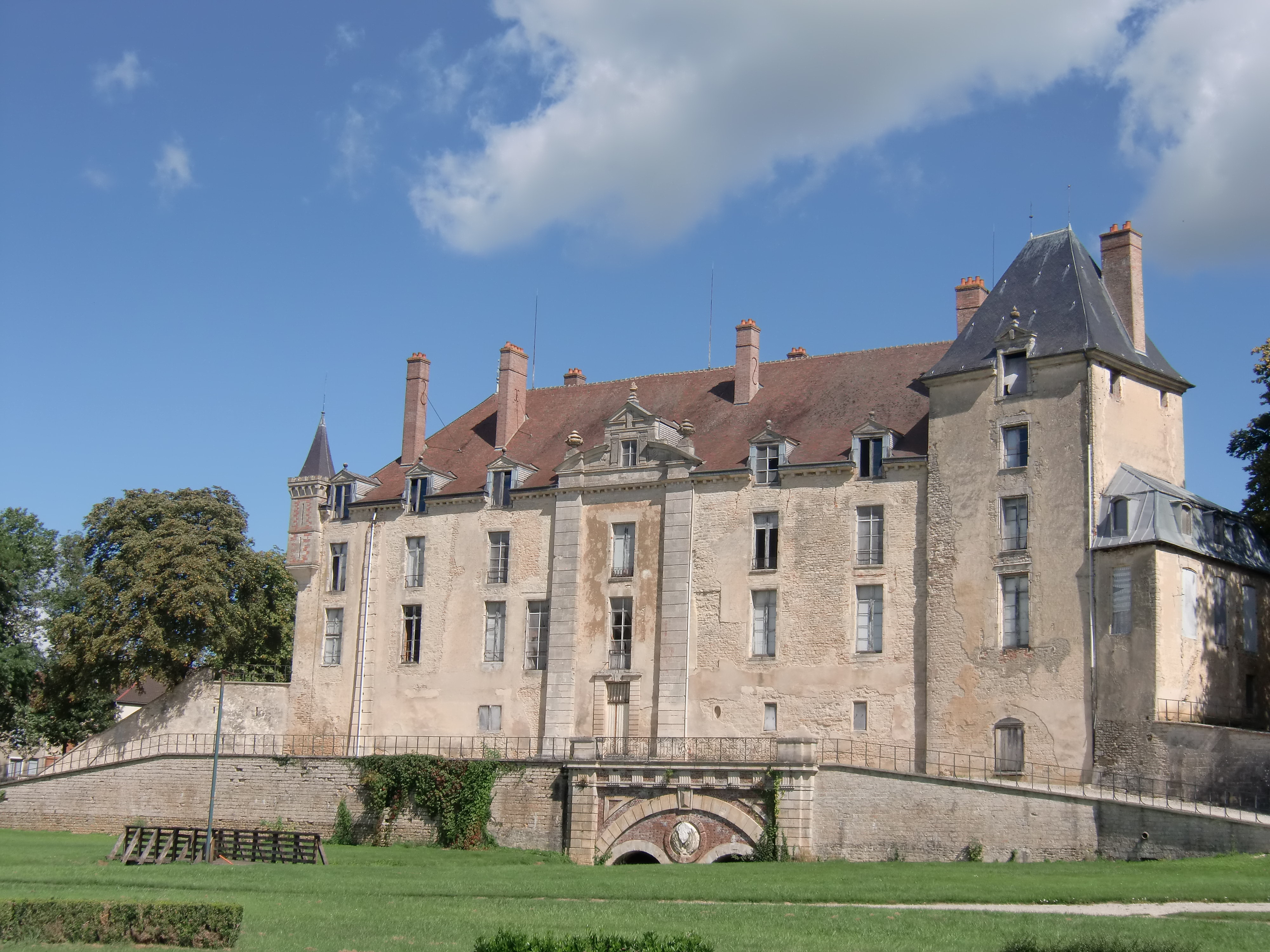 Château de Vendeuvre-sur-Barse